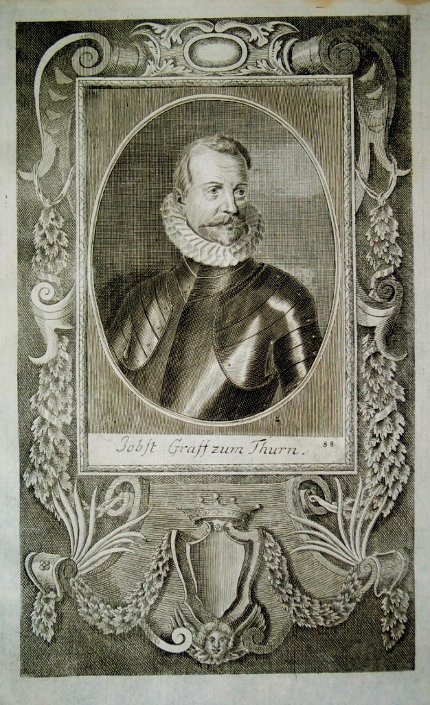 Joseph Graf von Thurn (1533 - 1589): Jobst Graff zum Thurn Oberbefehlshaber in Dalmatien und Kriegsrat bei Kaiser Rudolf II.